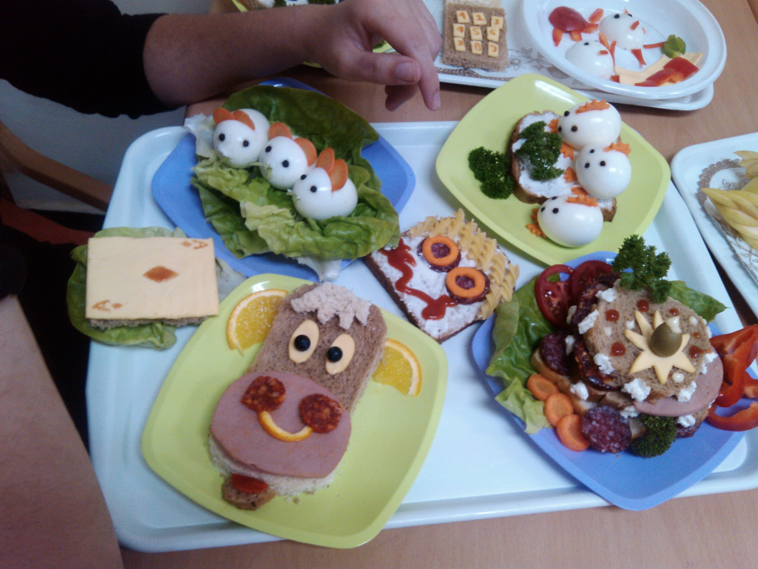 Animacija zdrave hrane